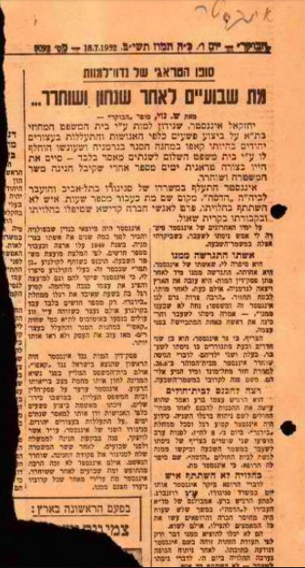 כתבה בעיתון שדיברה על יחזקאל אינגסטר